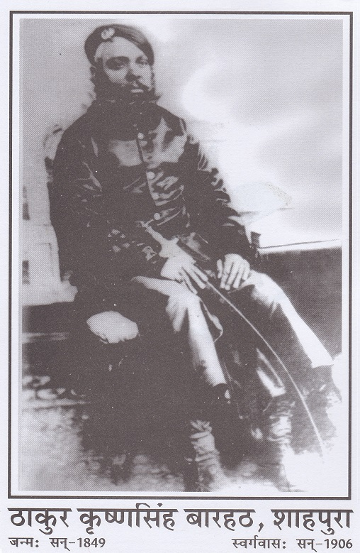 ठाकुर कृष्ण सिंह बारहट (सन 1849 - सन 1906) अर्ध-स्वतंत्र राज्य शाहपुरा के प्रतोली-पात्र (पोळपात), इतिहासकार, कवि एवं मनीषी थे। वे हिन्दी, संस्कृत, डिंगल, पिंगल के कवि एवं अंग्रेजी भाषा के भी अच्छे जानकार थे। राजस्थान में अंग्रेजों के विरुद्ध क्रांति की अलख जगाने वाले तथा अपनी तीन पीढ़ियों को क्रांतियज्ञ में आहूत करने वाले ठाकुर केसरी सिंह बारहट व जोरावर सिंह बारहट इनके पुत्र थे।